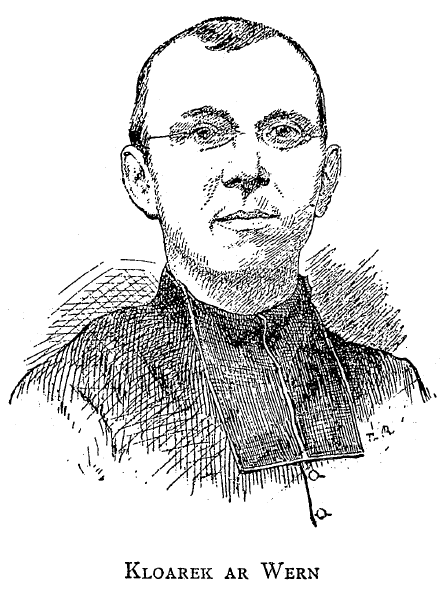 Poltred eus an ao. Louis Le Clerc (Kloareg ar Wern), tennet eus e levr Ma beaj Jeruzalem, embannet e 1903